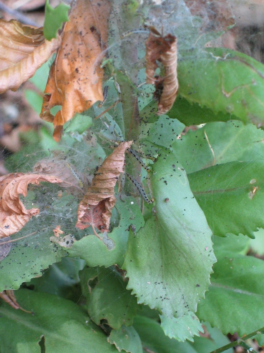 Raupen von Yponomeuta sedella